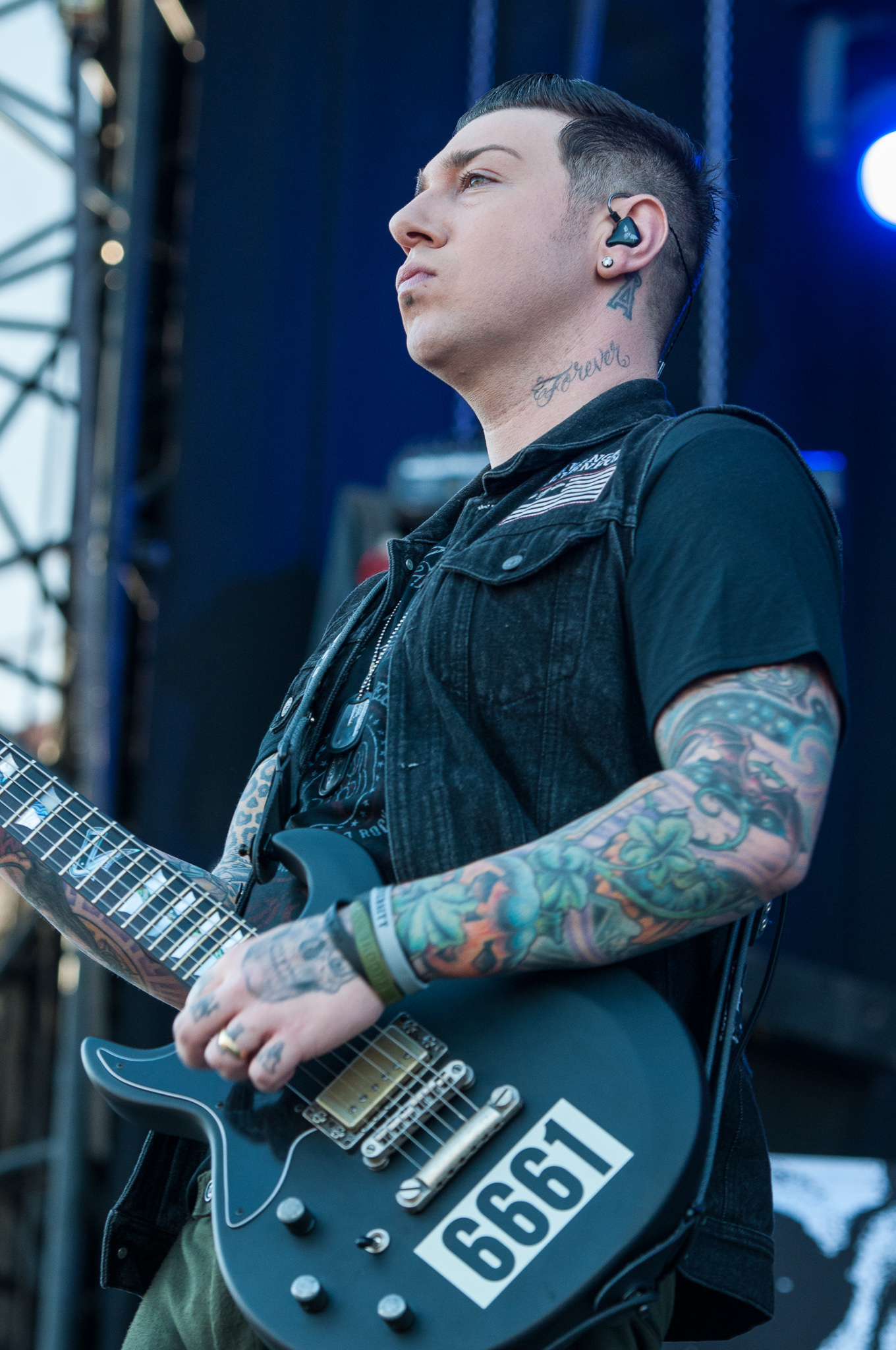 ARGO-Konzerte,Avenged Sevenfold,Konzert,Livekonzert,Livemusik,Musik,RiP,Rock im Park 2014,Zachery James Baker,Zacky Vengeance